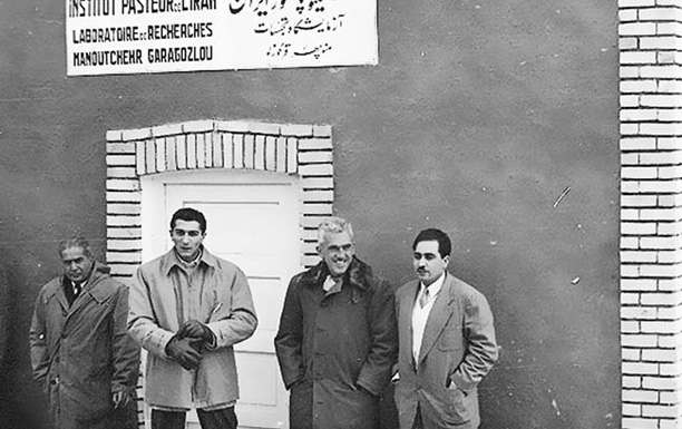 بالتازار